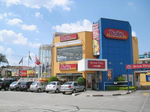 Fachada de uma lanchonete Bob's (Brasil)